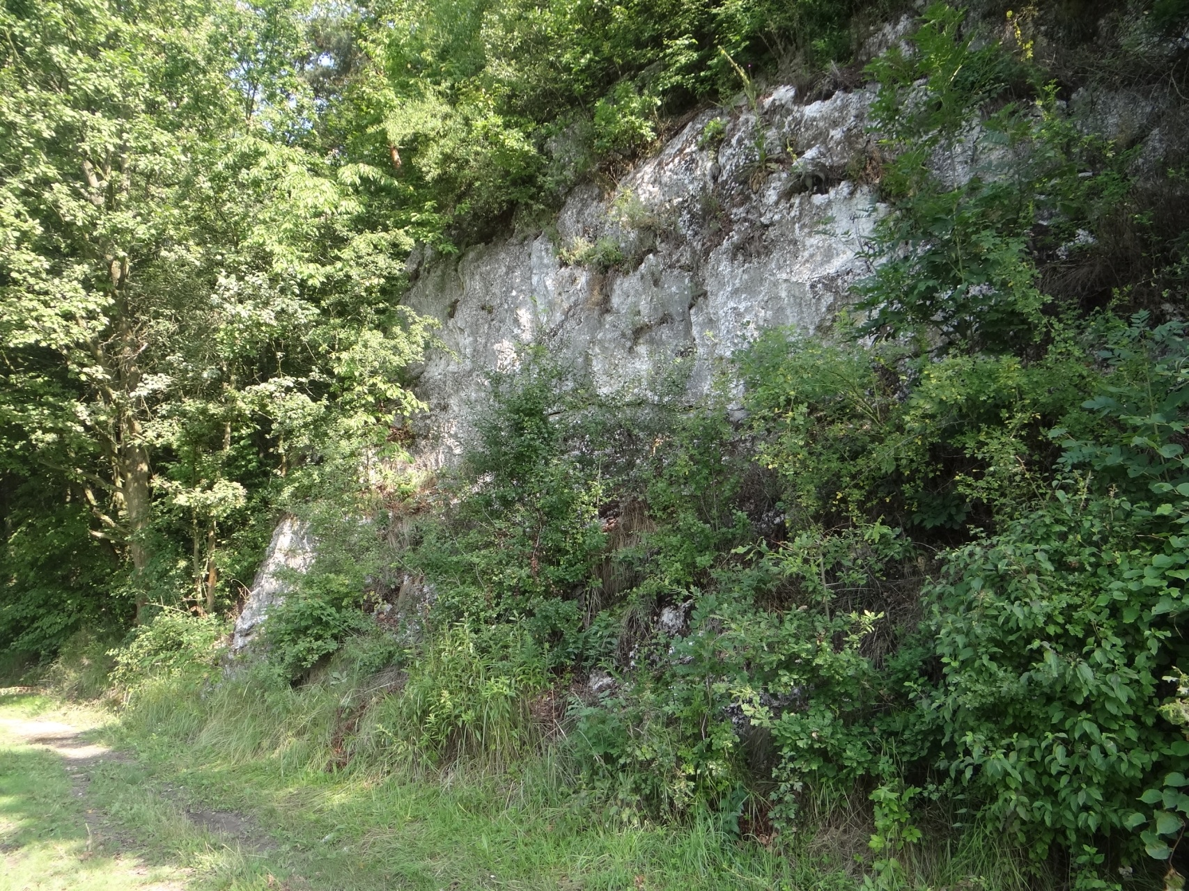 Skała Borsucza w Wąwozie Podskalańskim w Tomaszowicach